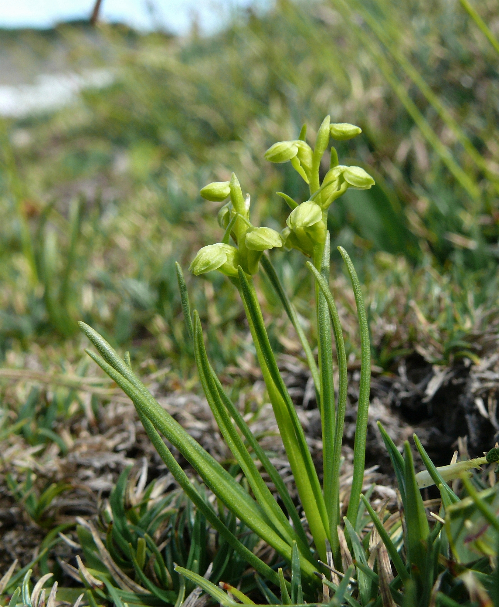 Chamorchis alpina, Allgäuer Alpen, Österreich